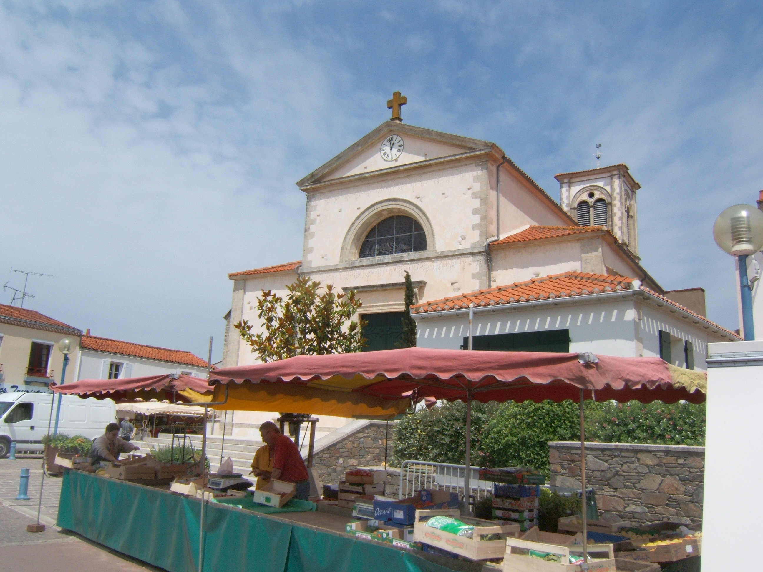 Brétignolles-sur-Mer en Vendée : l'église, la place et le marché (jeudi et dimanche toute l'année - mardi en juillet et août). A gauche de l'église, la rue du Clocher.